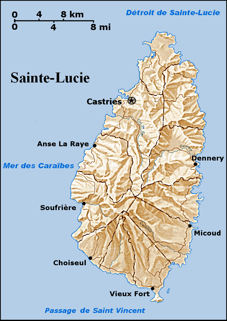 Carte géographique de Sainte-Lucie